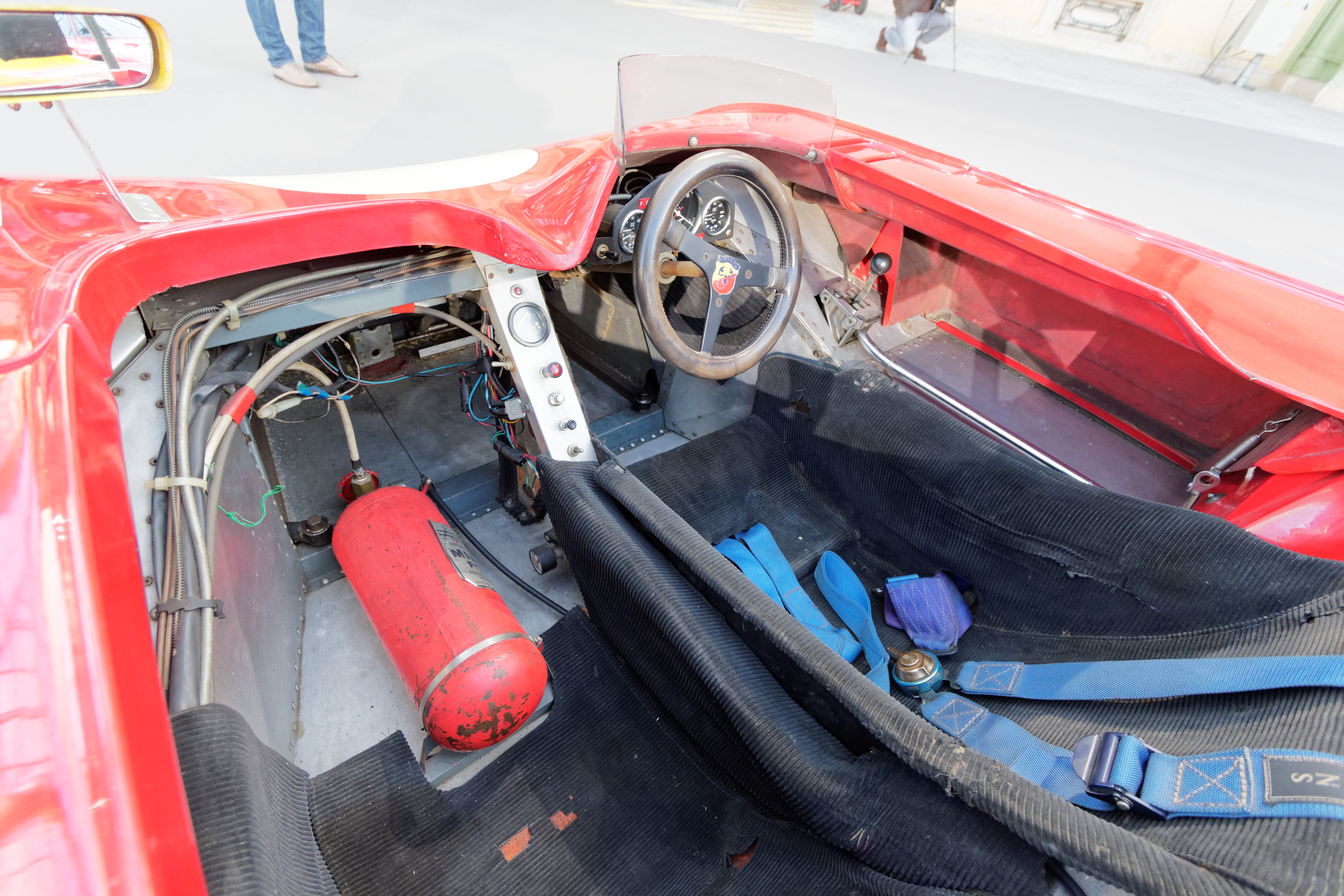 Un des véhicules présenté lors de la vente aux enchères Bonhams 2015 au Grand Palais de Paris.